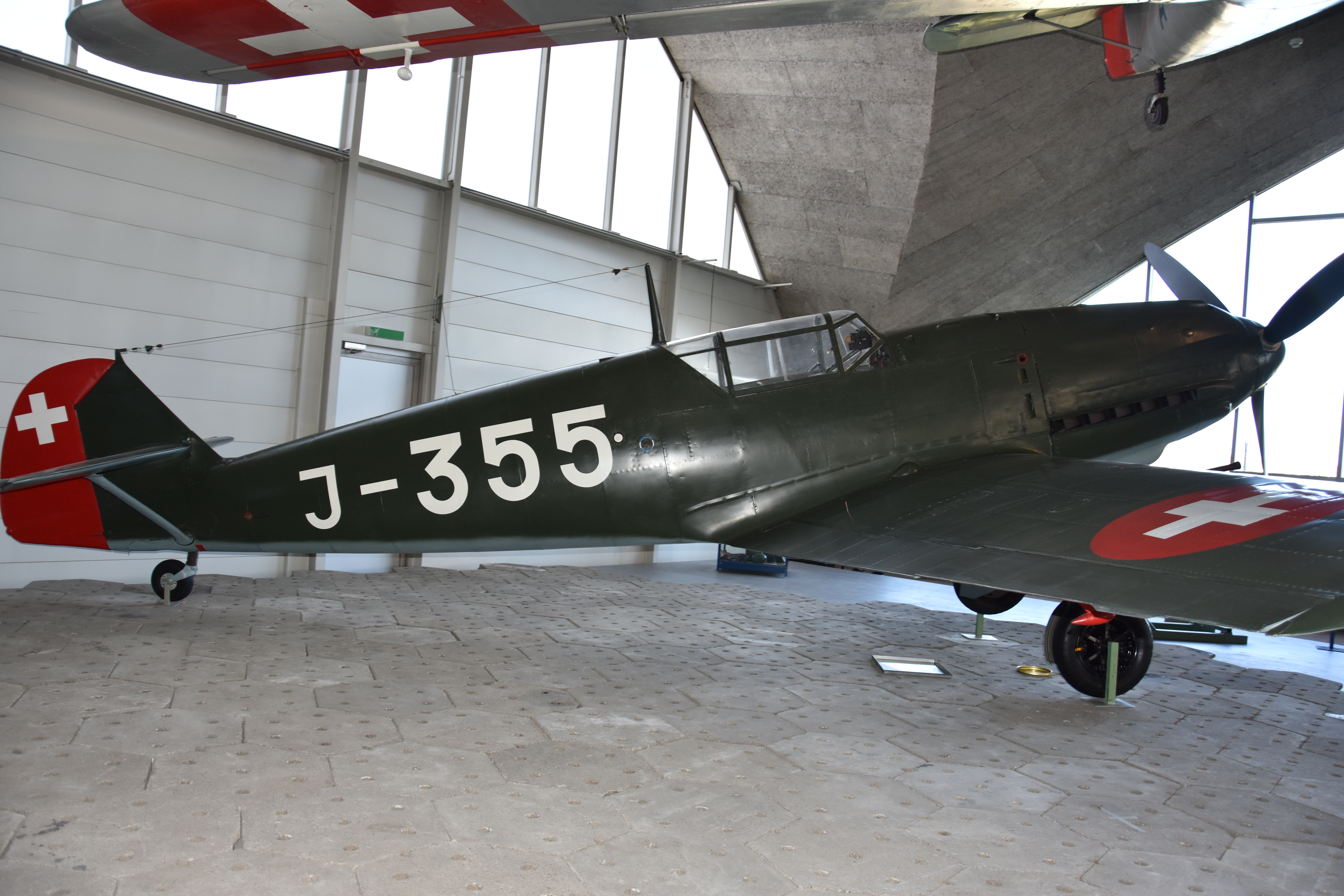 Das ist die Messerschmitt Bf-109 "Emil". Die Me-109 wurde von der Schweizer Luftwaffe kurz vor Kriegsbeginn noch gekauft.